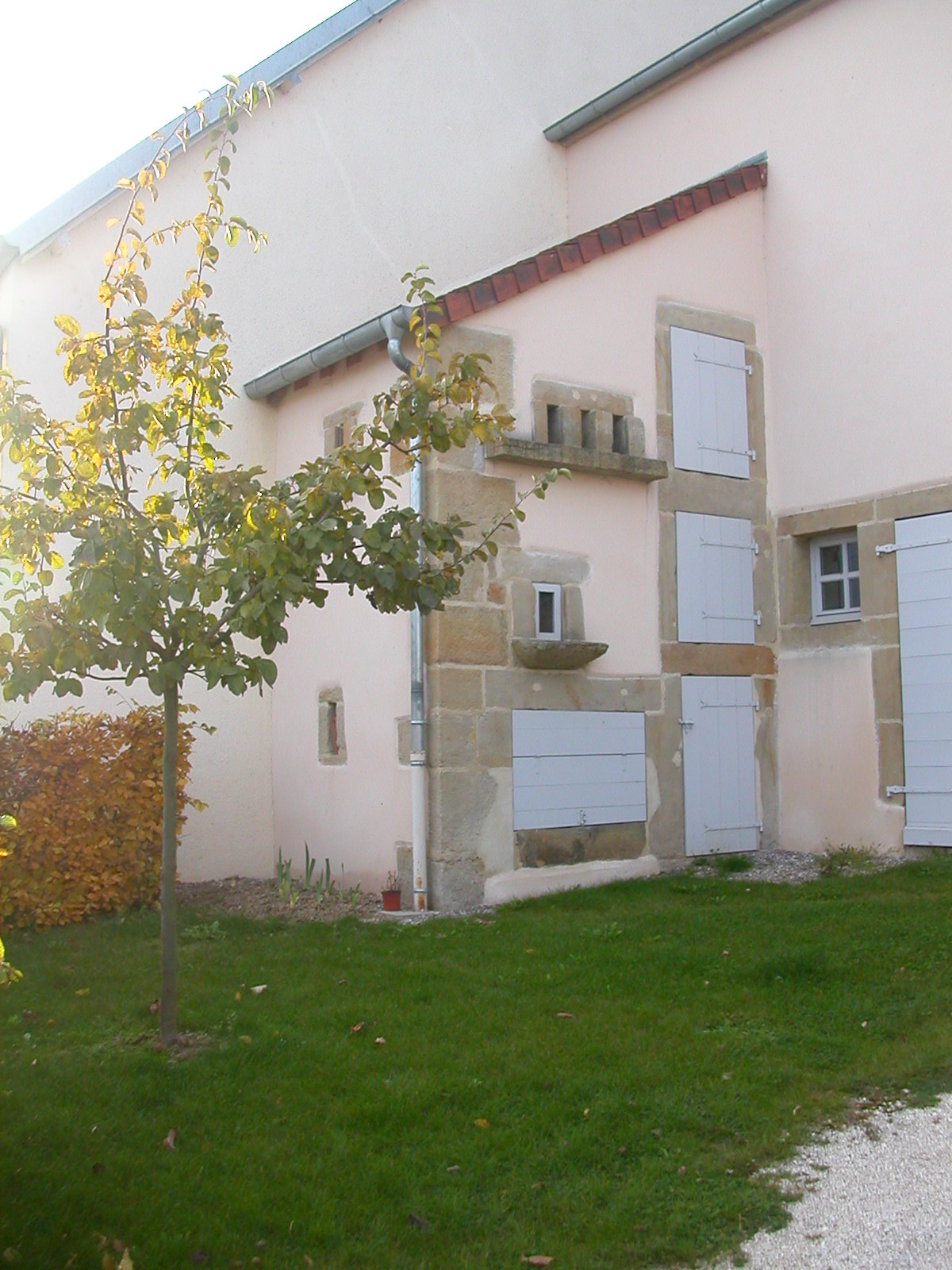 habitat rural de type 3P: porcherie, poulailler, pigeonnier - très bien rénové et très rare à retrouver dans cet état.